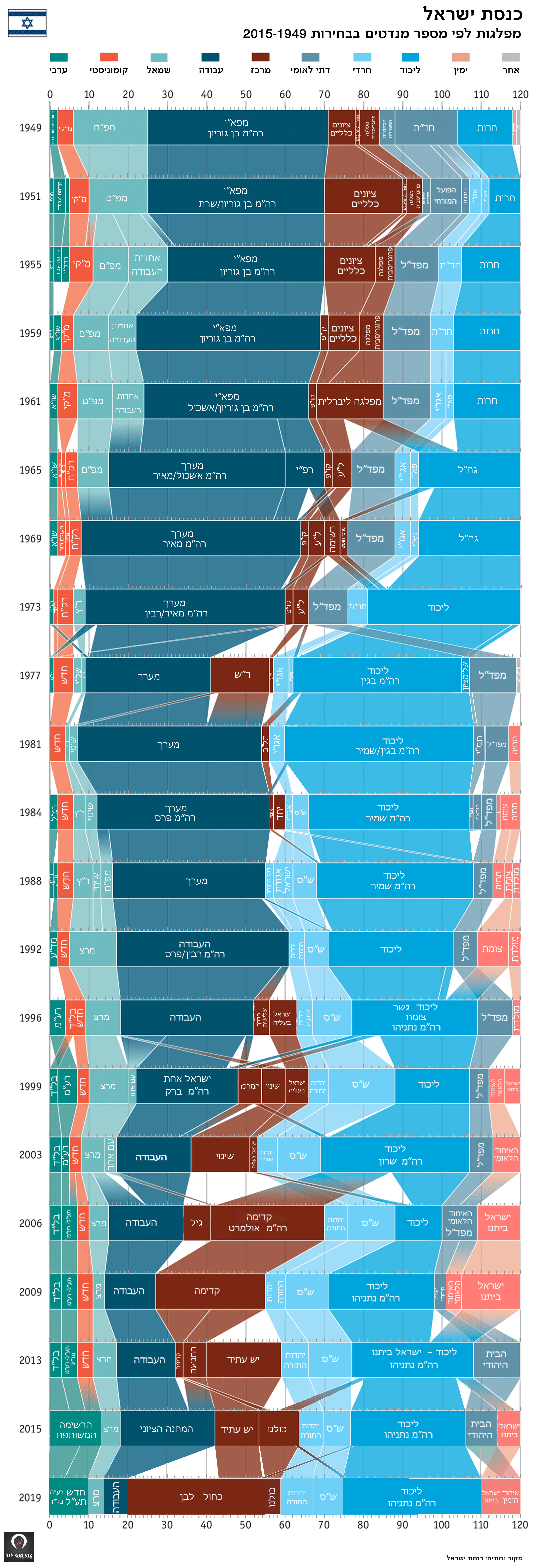 היסטוריית בחירות לכנסת ישראל 2019-1948